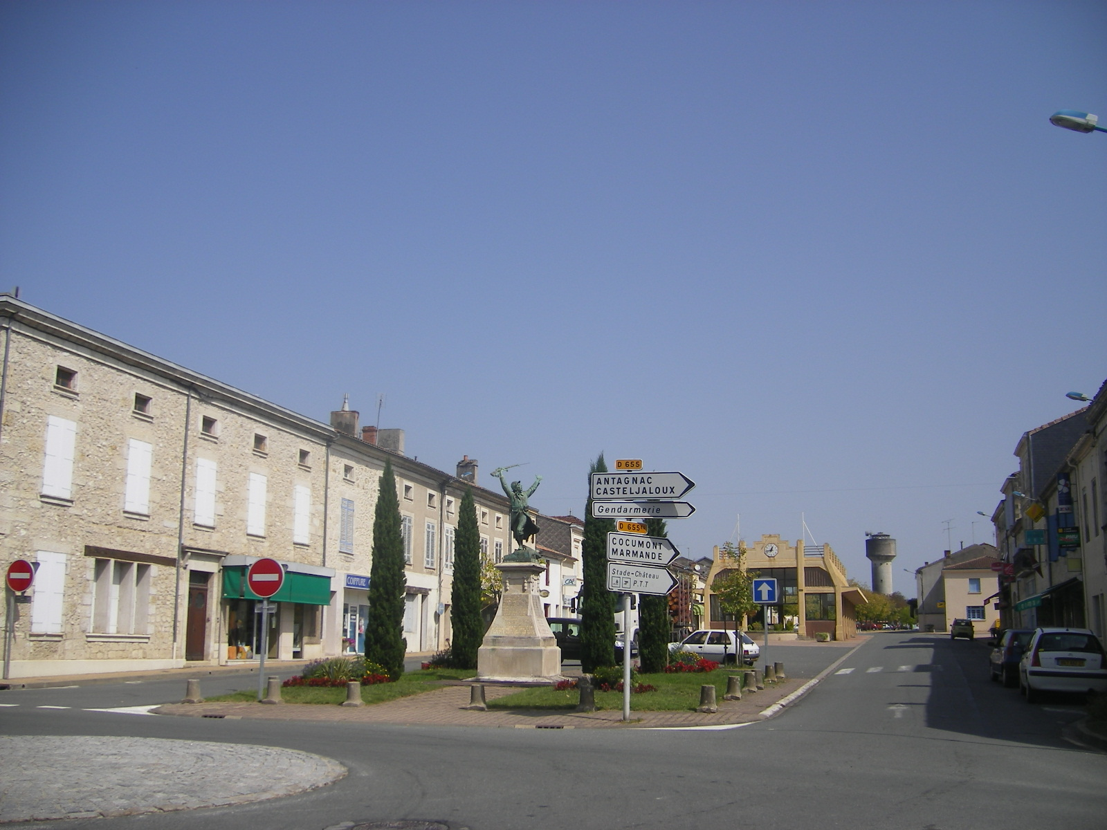 Grignols